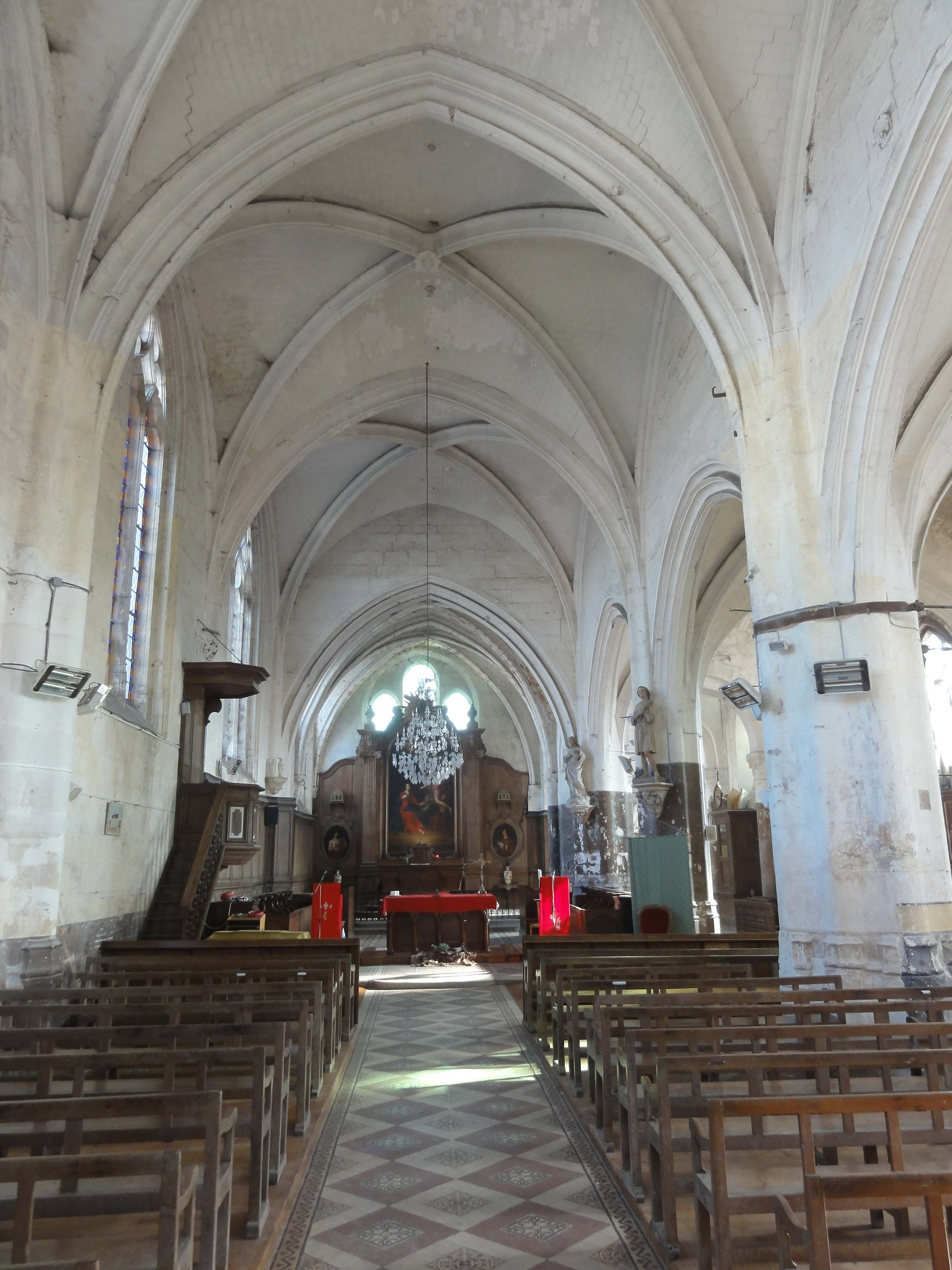 Intérieur de l'église - voir titre.